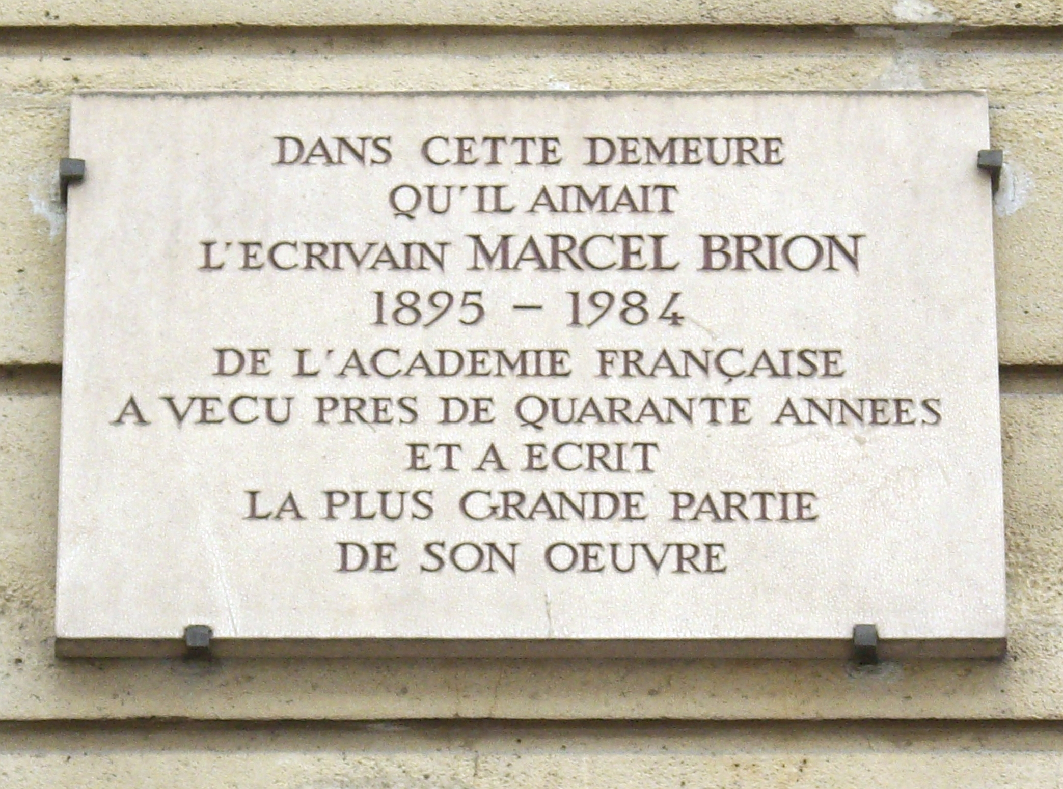 Plaque apposée au n° 32 de la rue du Bac, Paris 6e. « Dans cette demeure qu'il aimait, l'écrivain Marcel brion, 1895-1984, de l'Académie française, a vécu près de quarante années et a écrit la plus grande partie de son œuvre. »